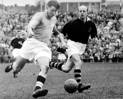 Charles Gustafsson Malmö FF i kamp med Bruno Nyberg AIK på Råsunda den 7 oktober 1956